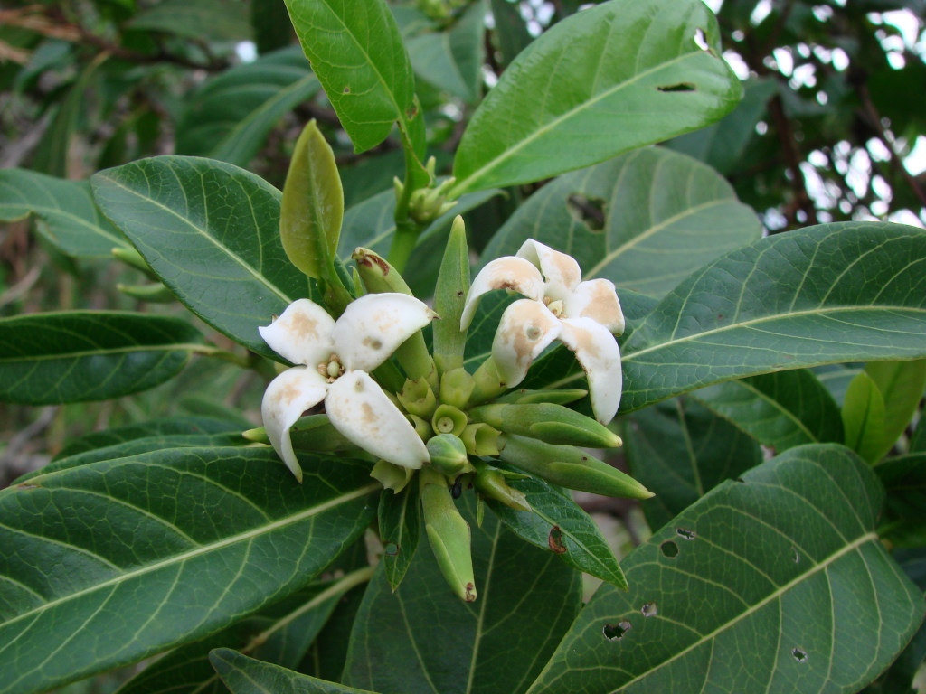 Alibertia edulis (Rich.) A.Rich. (bas. Genipa edulis Rich. ) - RUBIACEAE - Parque Estadual da Serra dos Pirineus - Pirenópolis - Goiás - Brasil.